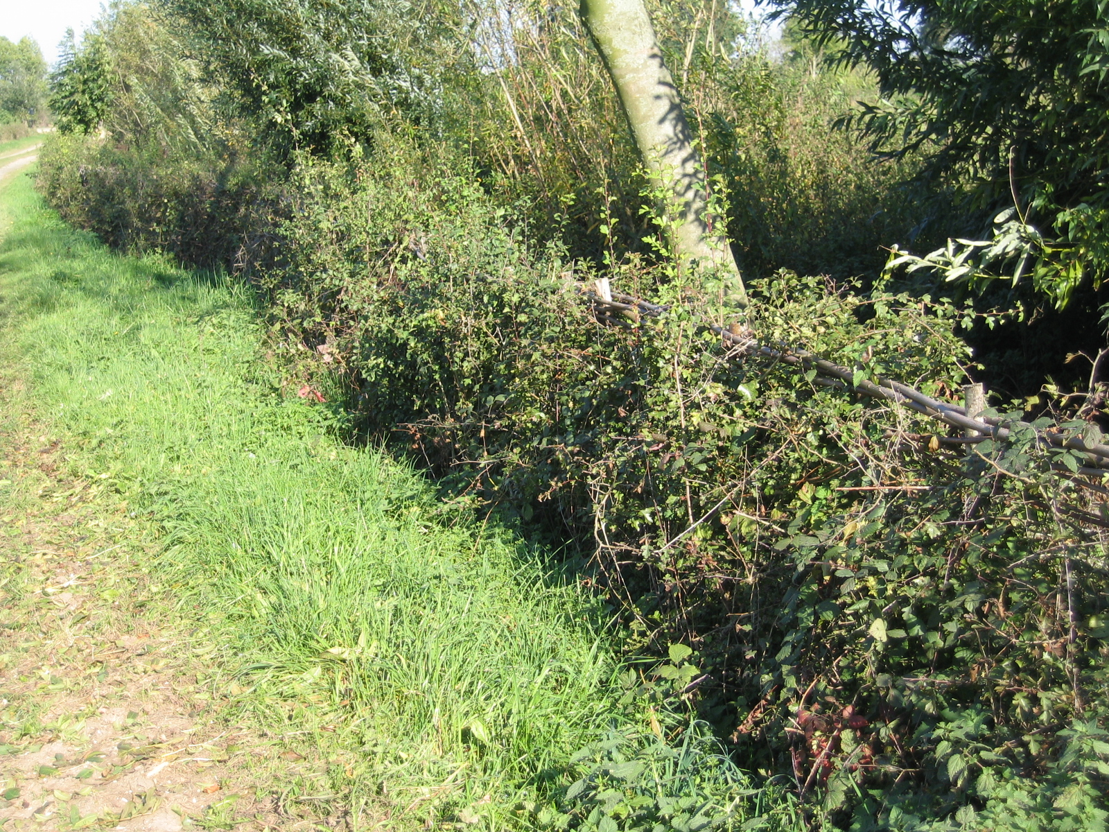 Vlechtwerk. De Maasheggen zijn een natuurgebied in het noordoosten van de Nederlandse provincie Noord-Brabant.